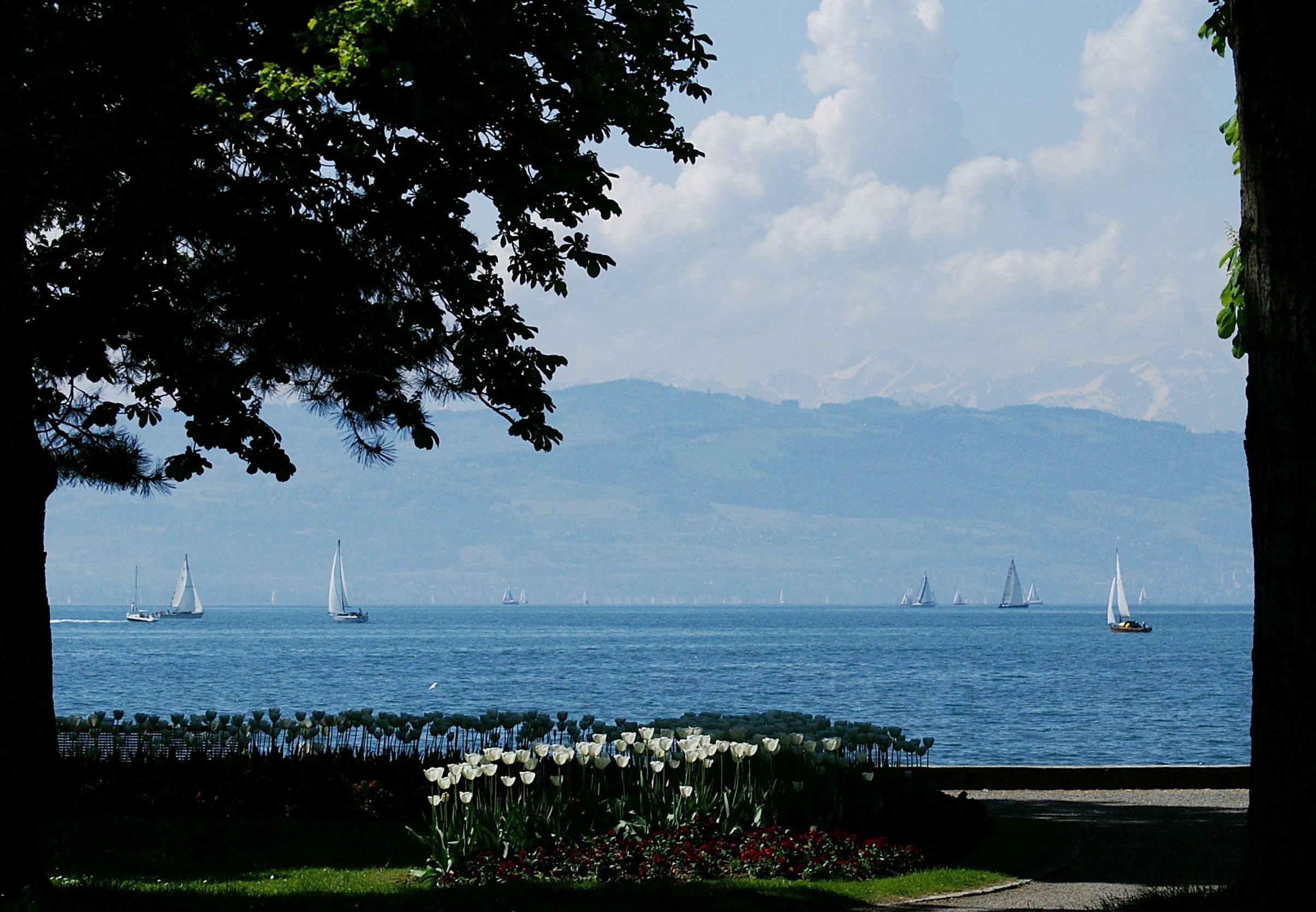 am Seeufer in Wasserburg am Bodensee).